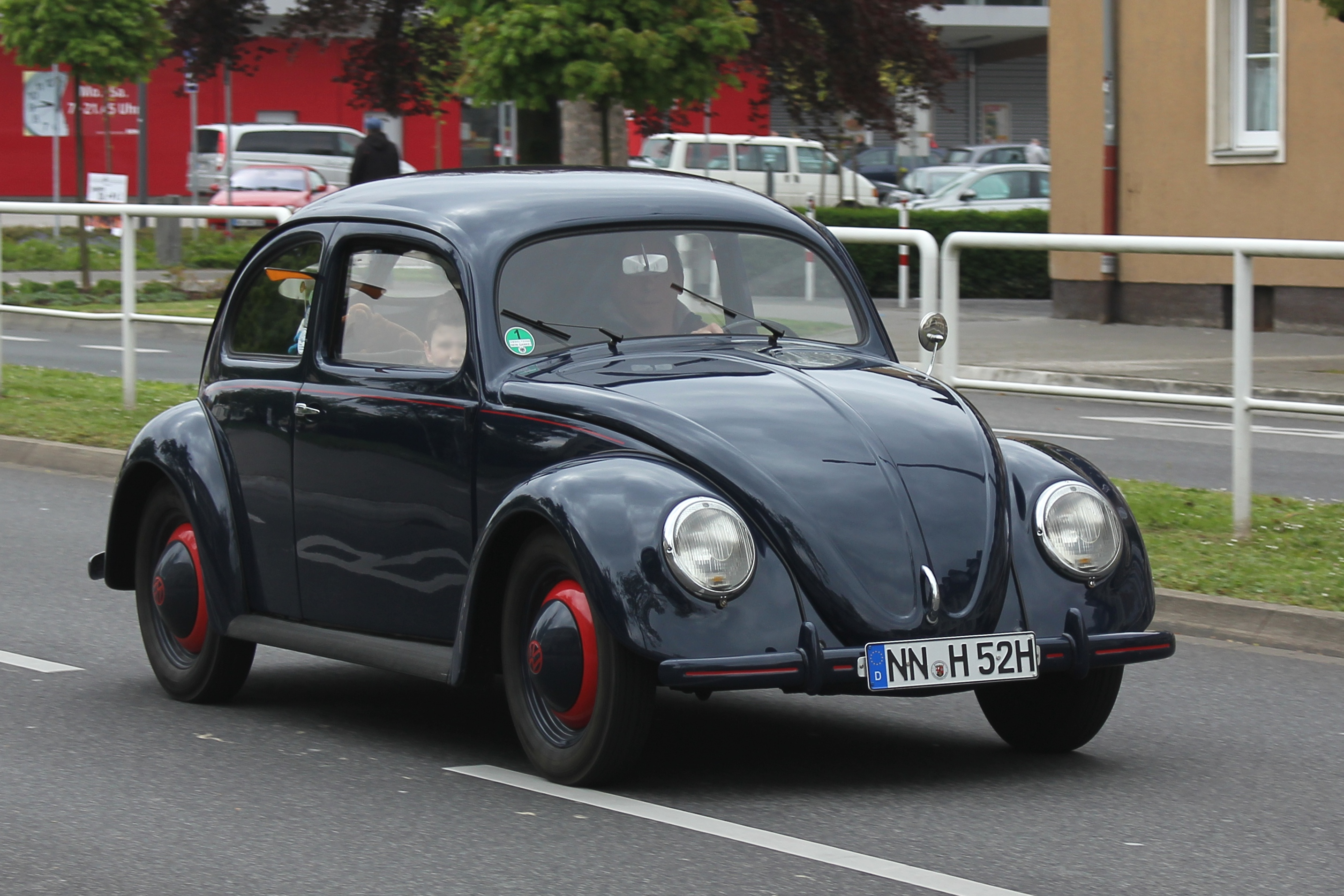 VW Standard (Typ 1), Baujahr 1952, mit ursprünglichem Winker als Fahrtrichtungsanzeiger (fiktives Kennzeichen)